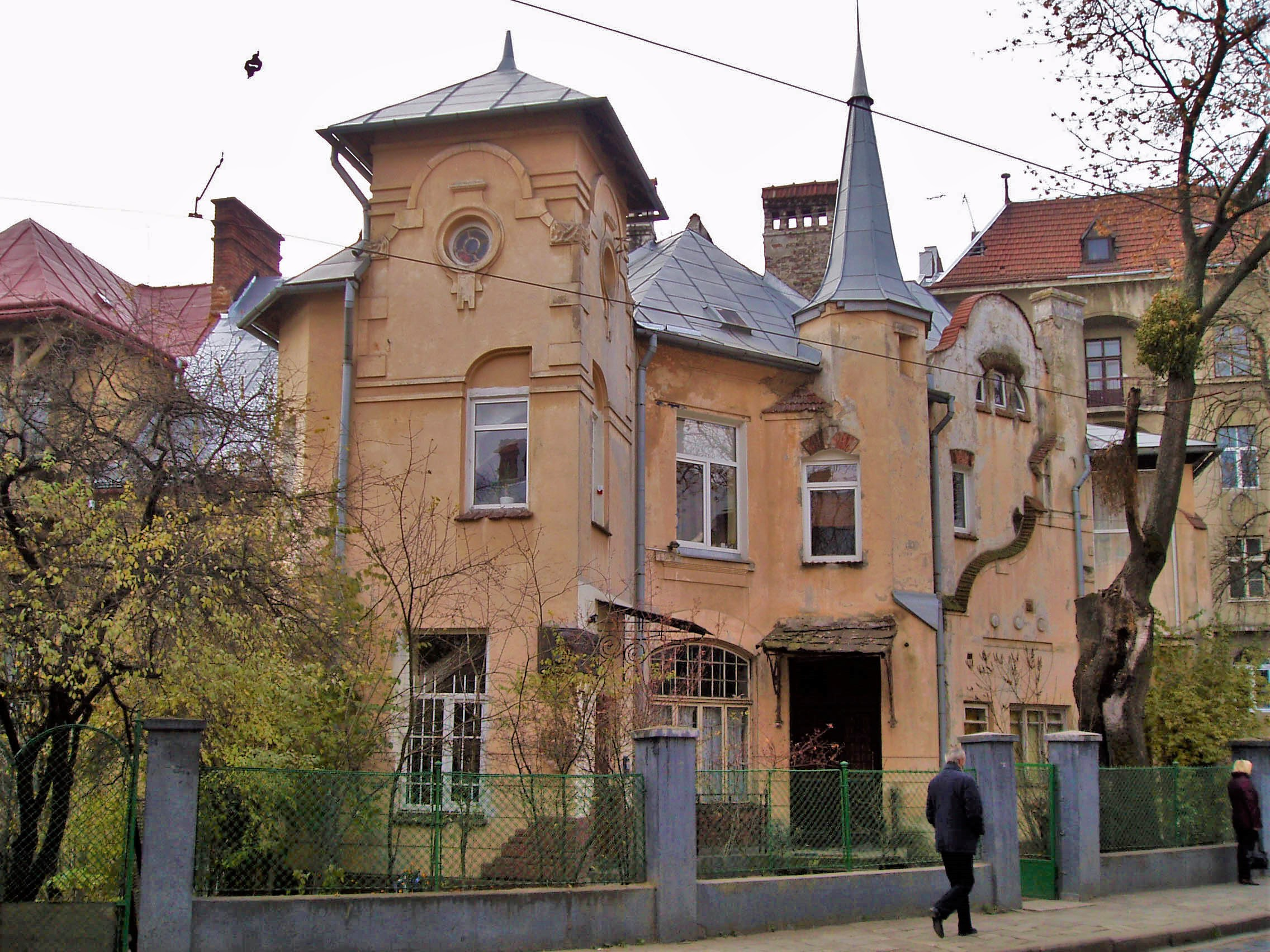 Дім № 27 на вулиці Котляревського у Львові. Архітектор Владислав Садловський (1869-1940).